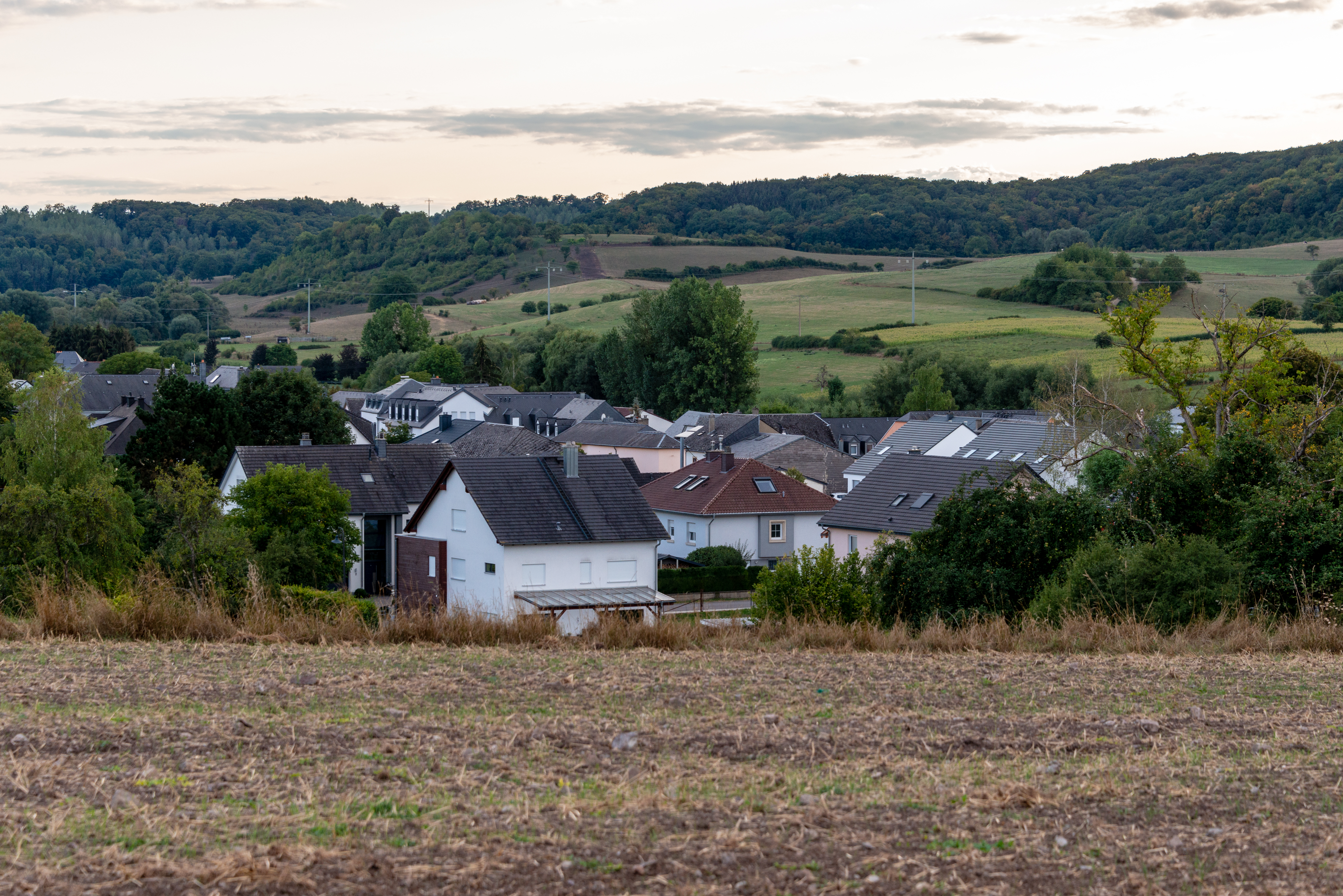 Owes-Vue op Ierpeldeng vum Flouer “Näinkiirchen”.